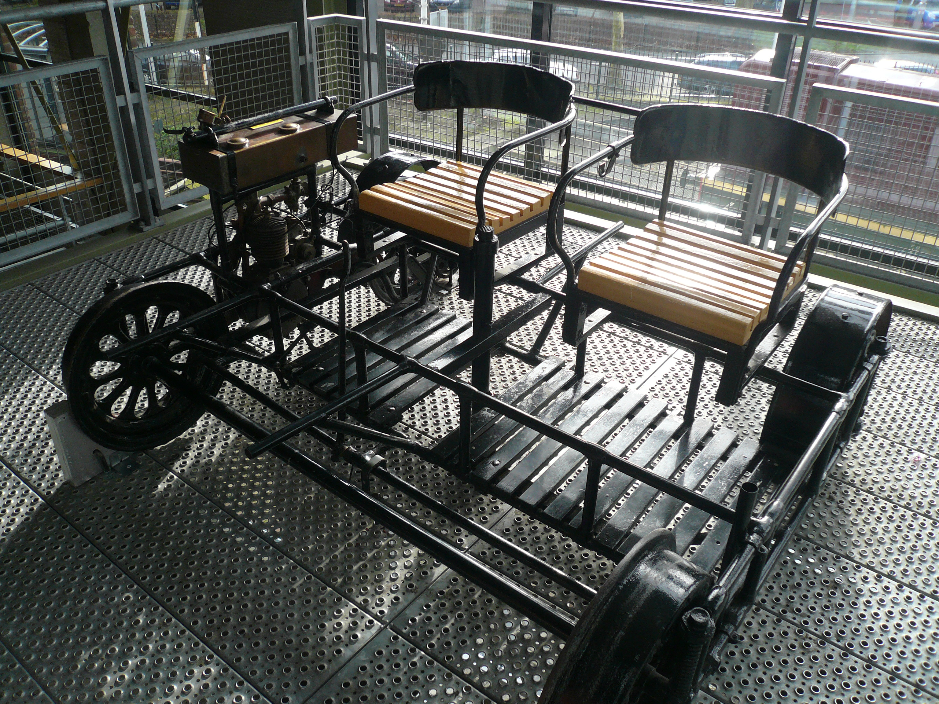 Motordraisine, Simplex Met dit voertuig uit circa 1910 van de Noord Brabantse Duitse Spoorwegmaatschappij (NBDS) konden opzichters en inspecteurs de spoorbaan en de werkploegen inspecteren. Dankzij de motor konden zij snel grote afstanden afleggen. Railway Museum (Utrecht, Netherlands)